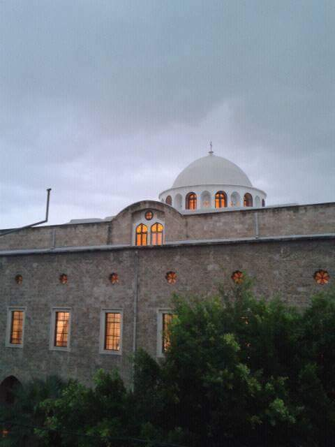 كنيسة مار جرجس الأثرية للروم الأرثوذكس في طرابلس